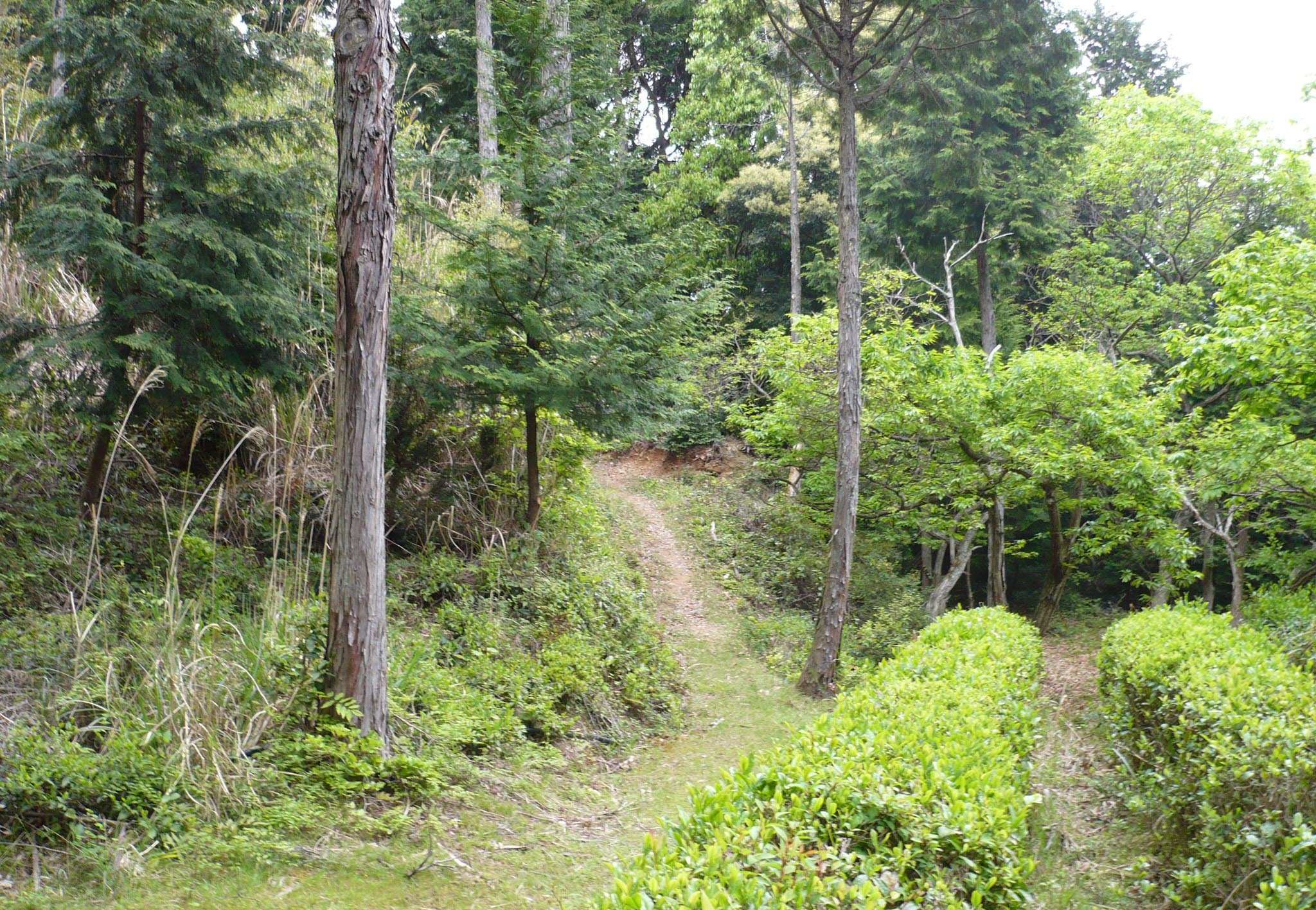 神尾山の登山口